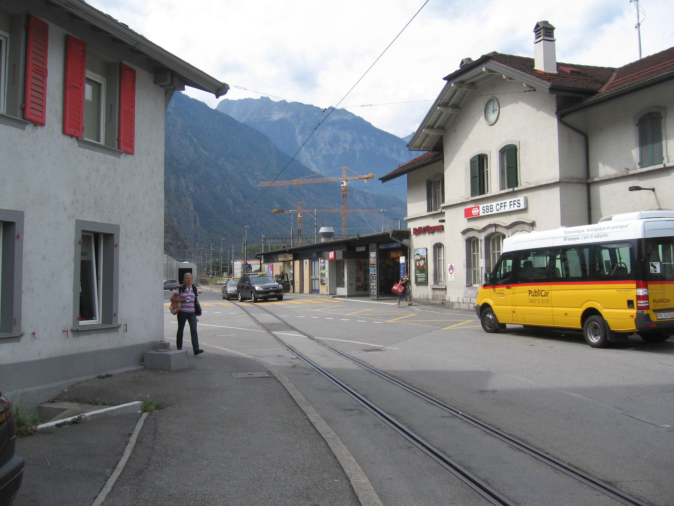 vue de la gare de Martigny (Suisse) côté ville